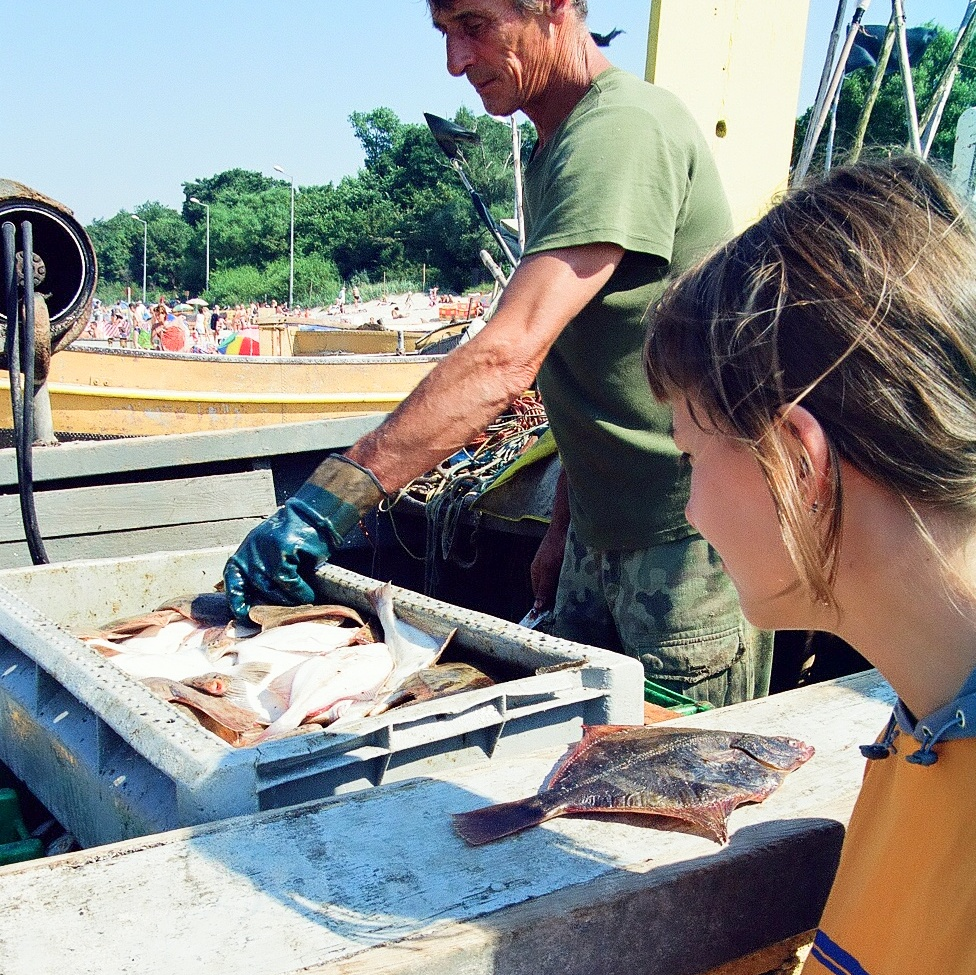 Przystań rybacka na plaży w Niechorzu. Można tu kupić świeżo złowione ryby bezpośrednio od rybaków. Fotografia z sierpnia 2002 r.